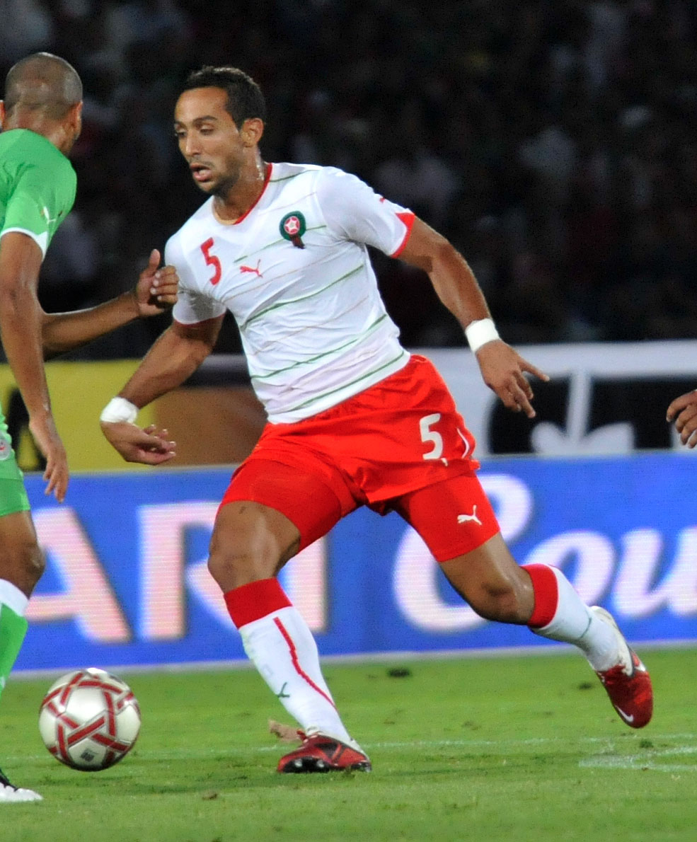 Match Maroc - Algérie. Medhi Benatia.